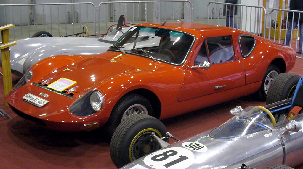 Melkus RS 1000